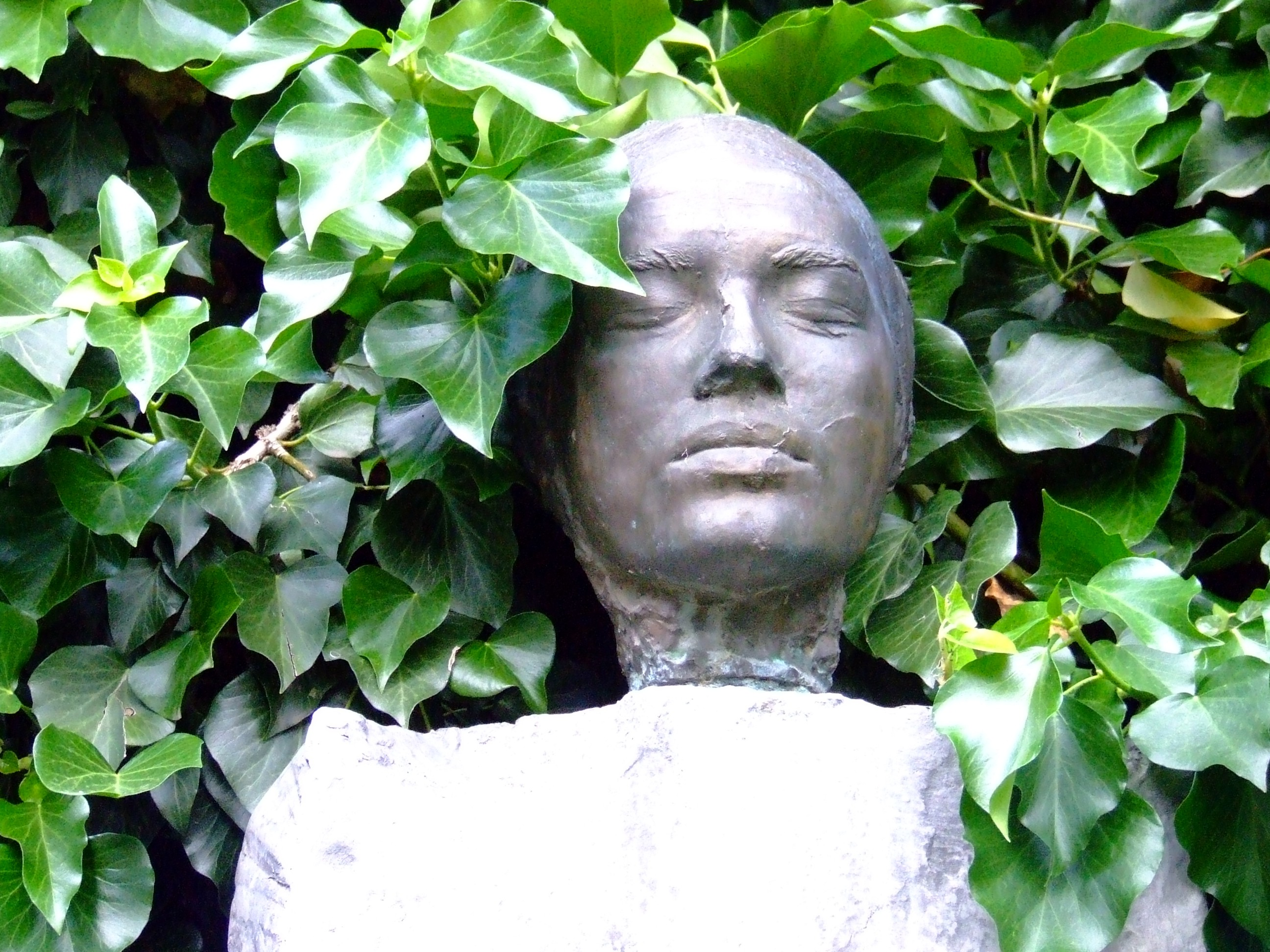 Schaár Erzsébet Önarckép című szobra Pécsen (részlet)